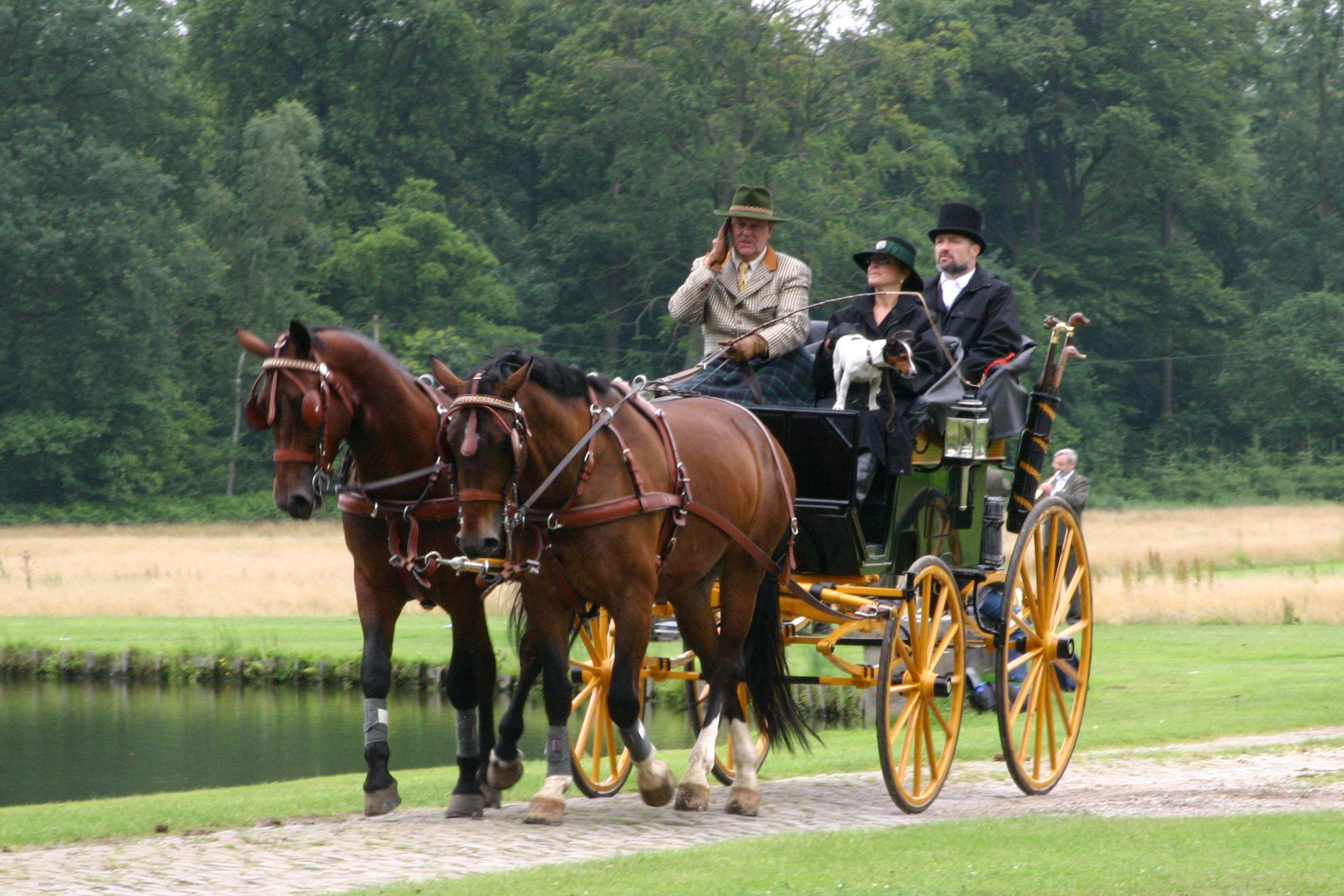 En amerikanesche Char-a-Banc. Kategorie:Kutschen